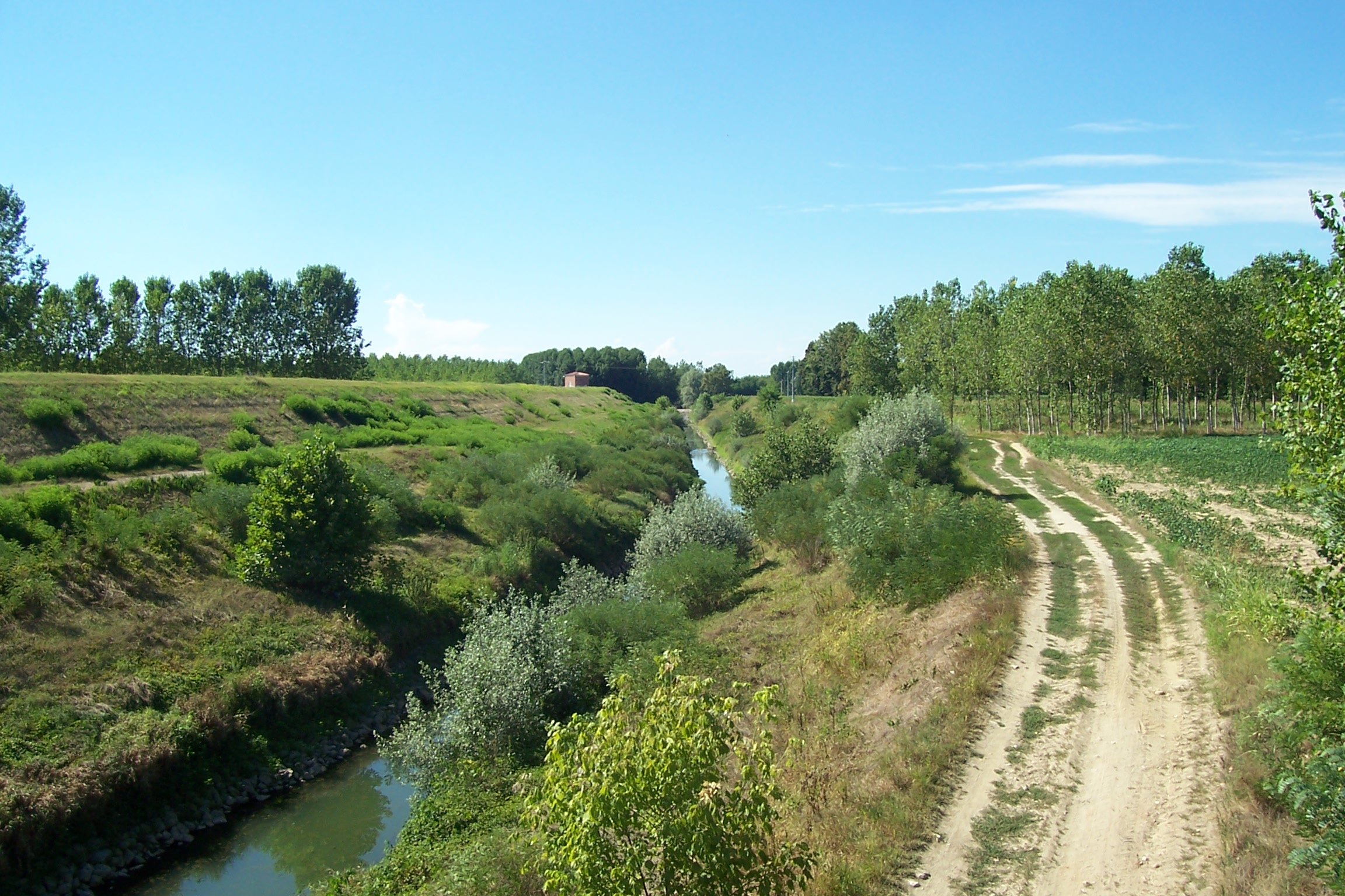 San Zenone al Po, l'Olona nuovo, un deviatore di piena a protezione del Paese, l'argine a sinistra nella foto, fa da schermo alle piene